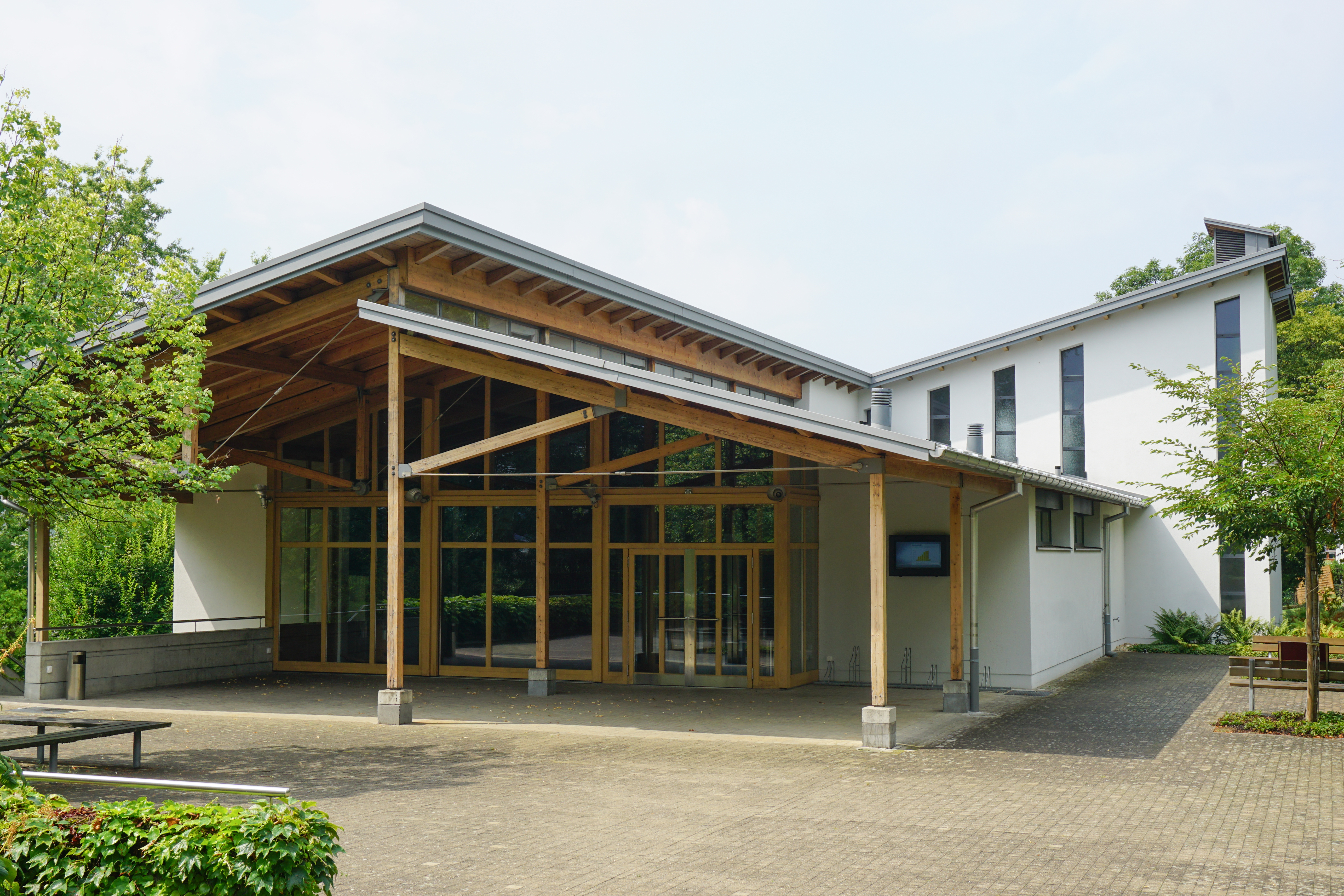 Ostseitige Eingangszone des Kirchenzentrums